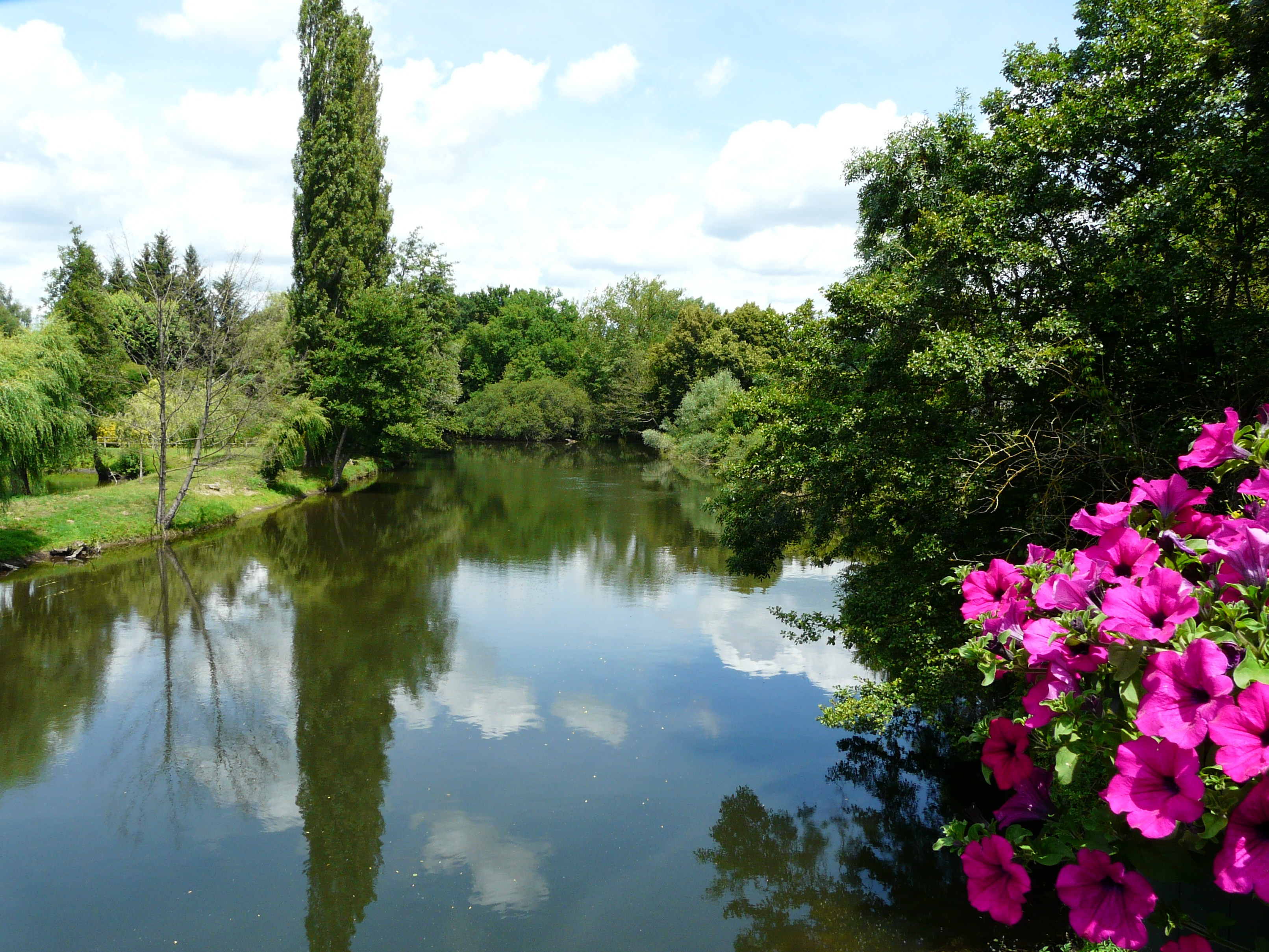 La Cère en amont du pont de la route départementale 940, entre Biars-sur-Cère (à gauche) et Bretenoux (à droite), Lot, France.